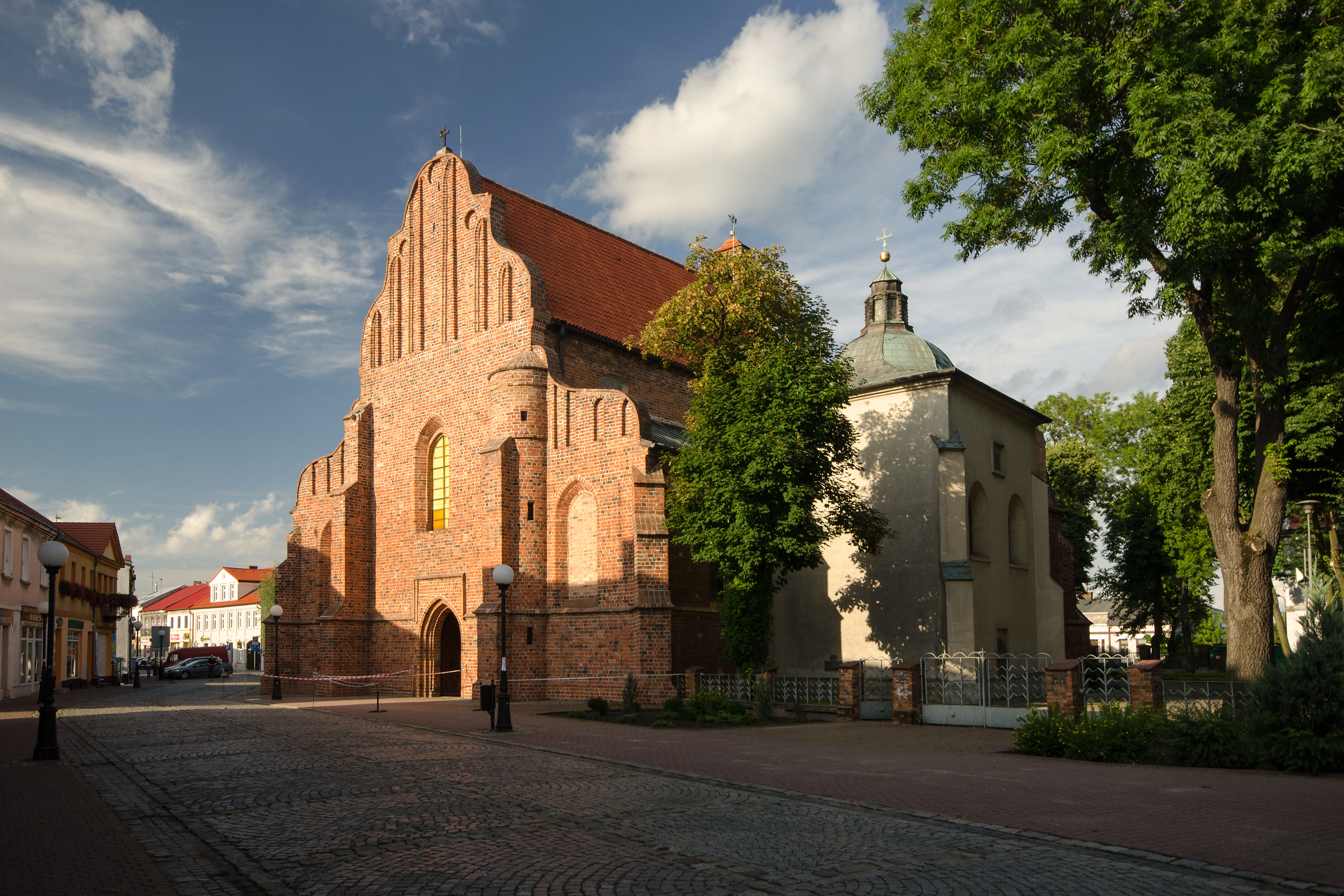 Konin, kościół par. p.w. św. Bartłomieja, XIV, 1866-1872, 1900-1910